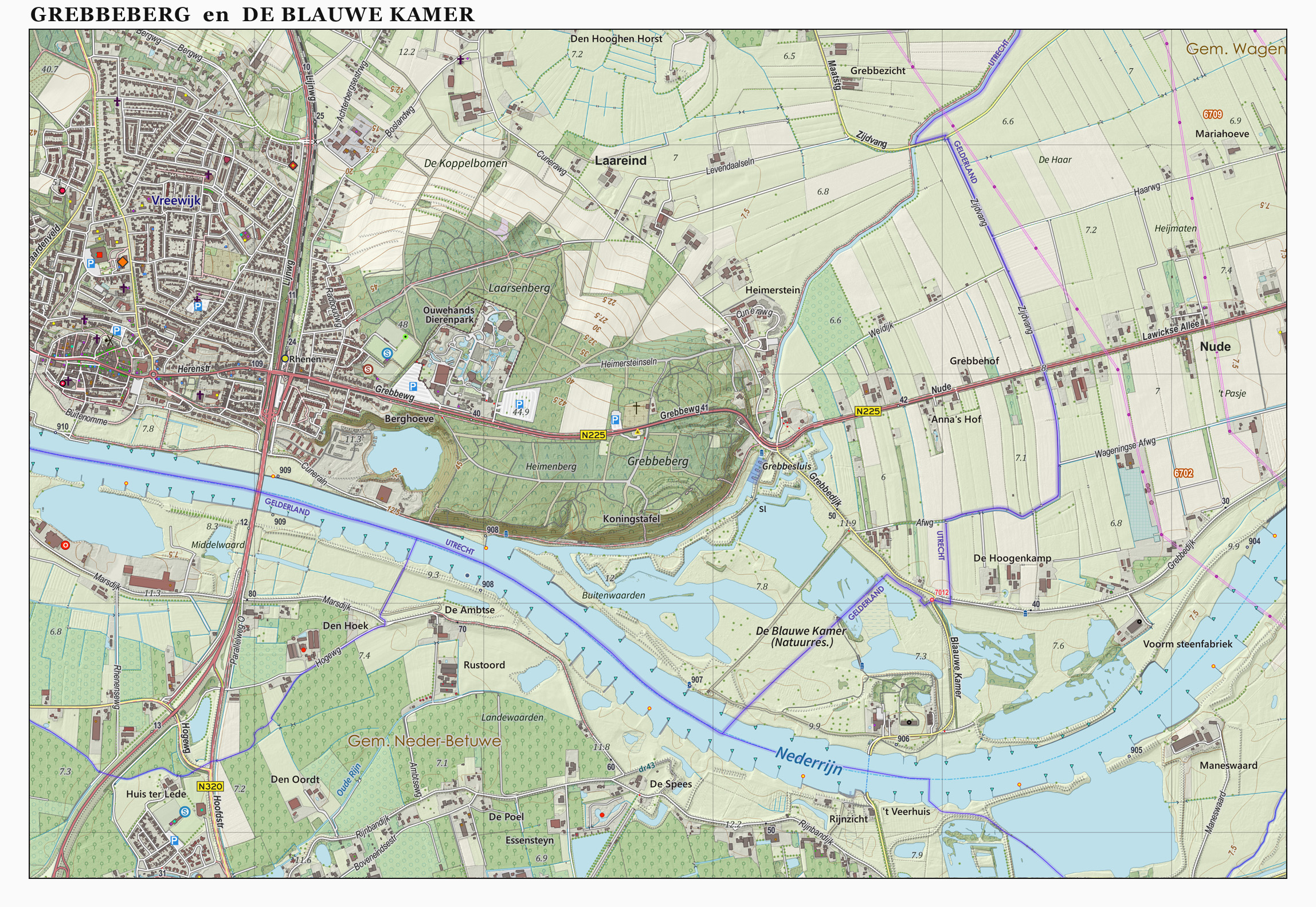 Topografische natuurkaart. Resolutie: 400 pixels/km. Samengesteld door Jan-Willem van Aalst op basis van de GML open geodata van de BRT/Top10NL (basisregistratie Topografie, Kadaster), vrijgegeven door Kadaster onder de Creative Commons BY licentie. Additionele gegevens uit BAG uit de Open Street Map en uit de Risicokaart. Zie ook de Legenda.